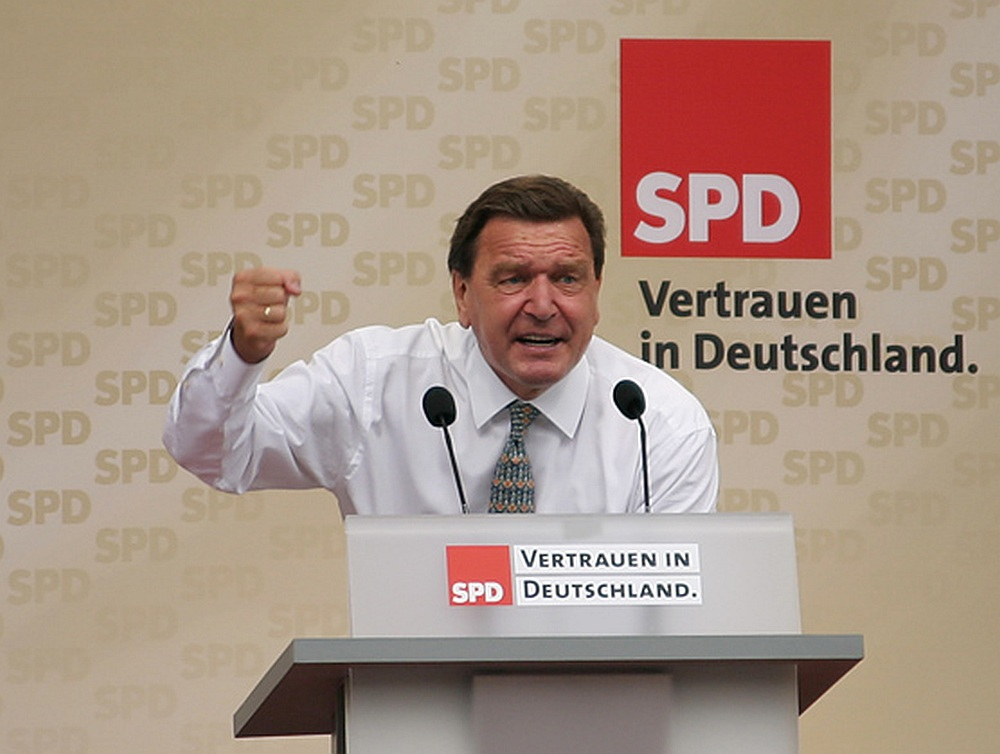 Bundeskanzler Gerhard Schröder bei einer Wahlkampfkundgebung der SPD am Münchner Marienplatz rund eine Woche vor der Bundestagswahl